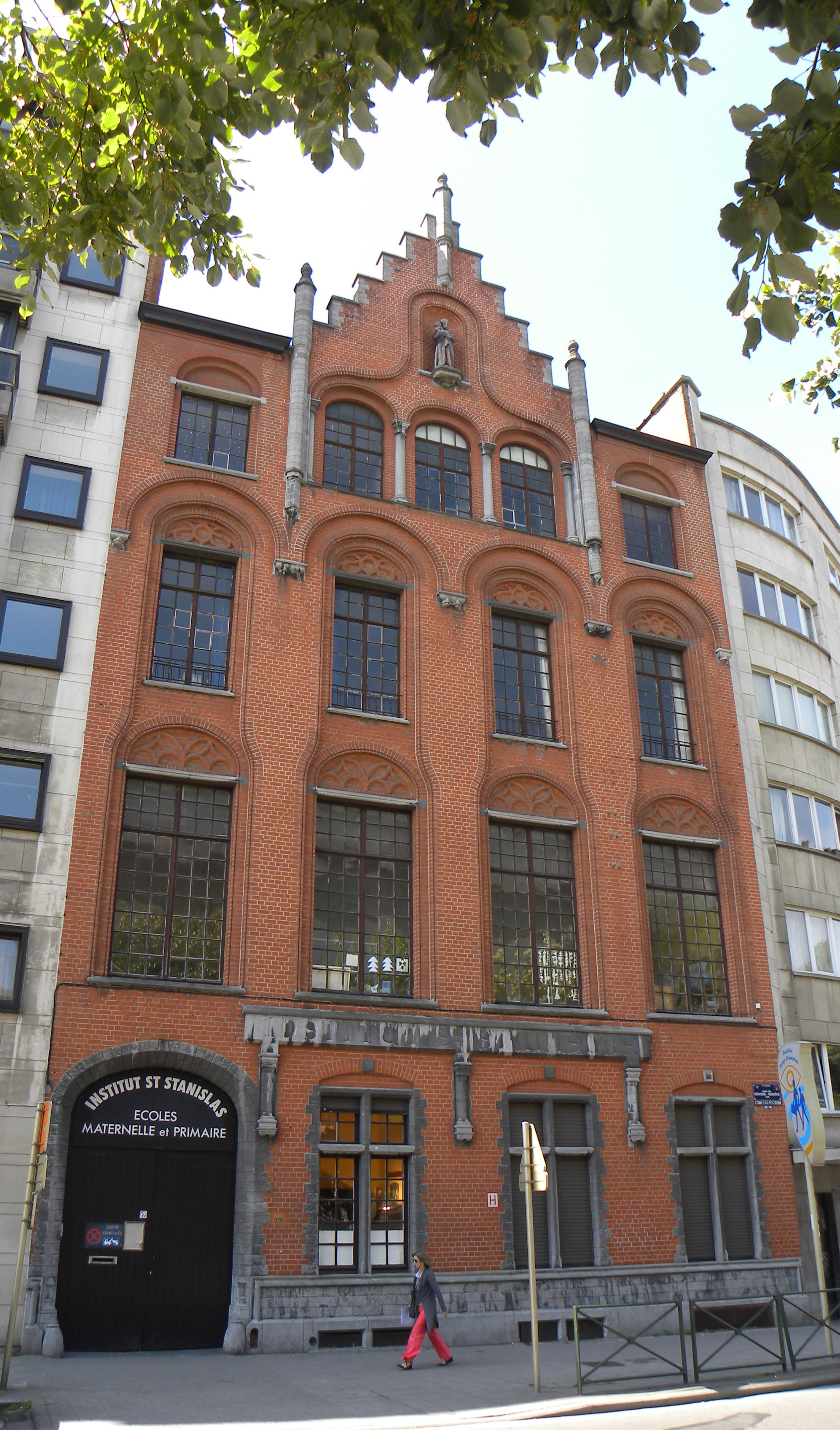 Façade de l'Institut Saint Stanislas Bruxelles, 115 avenue des Nerviens. Construction date 1903